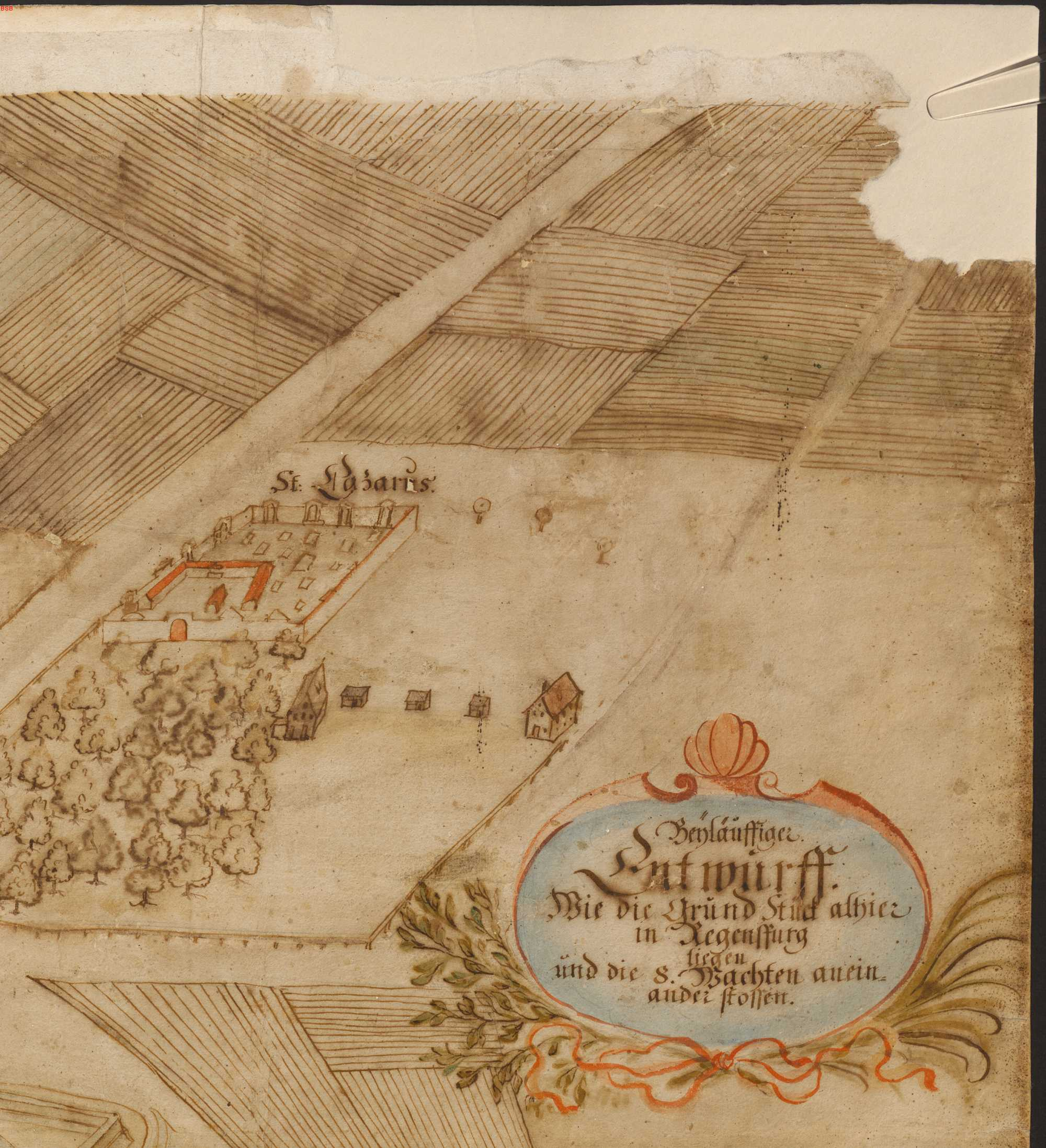 Stadtplan von Regensburg, 1700